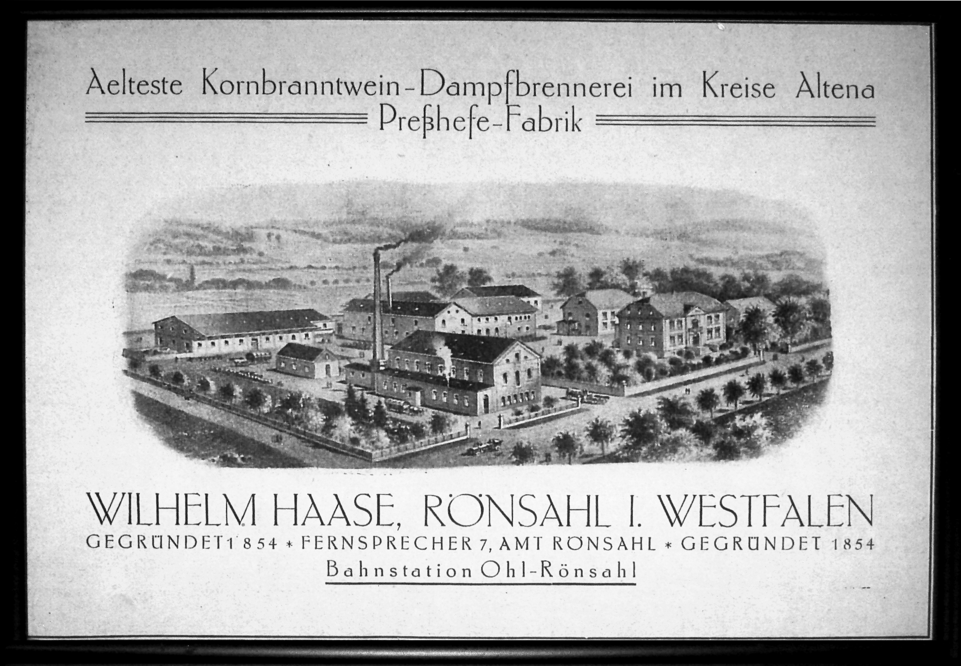 Kornbranntwein-Dampfbrennerei Wilhelm Haase, Rönsahl; jetzt Historische Brennerei Rönsahl, Hauptstraße 23 in Kierspe-Rönsahl.